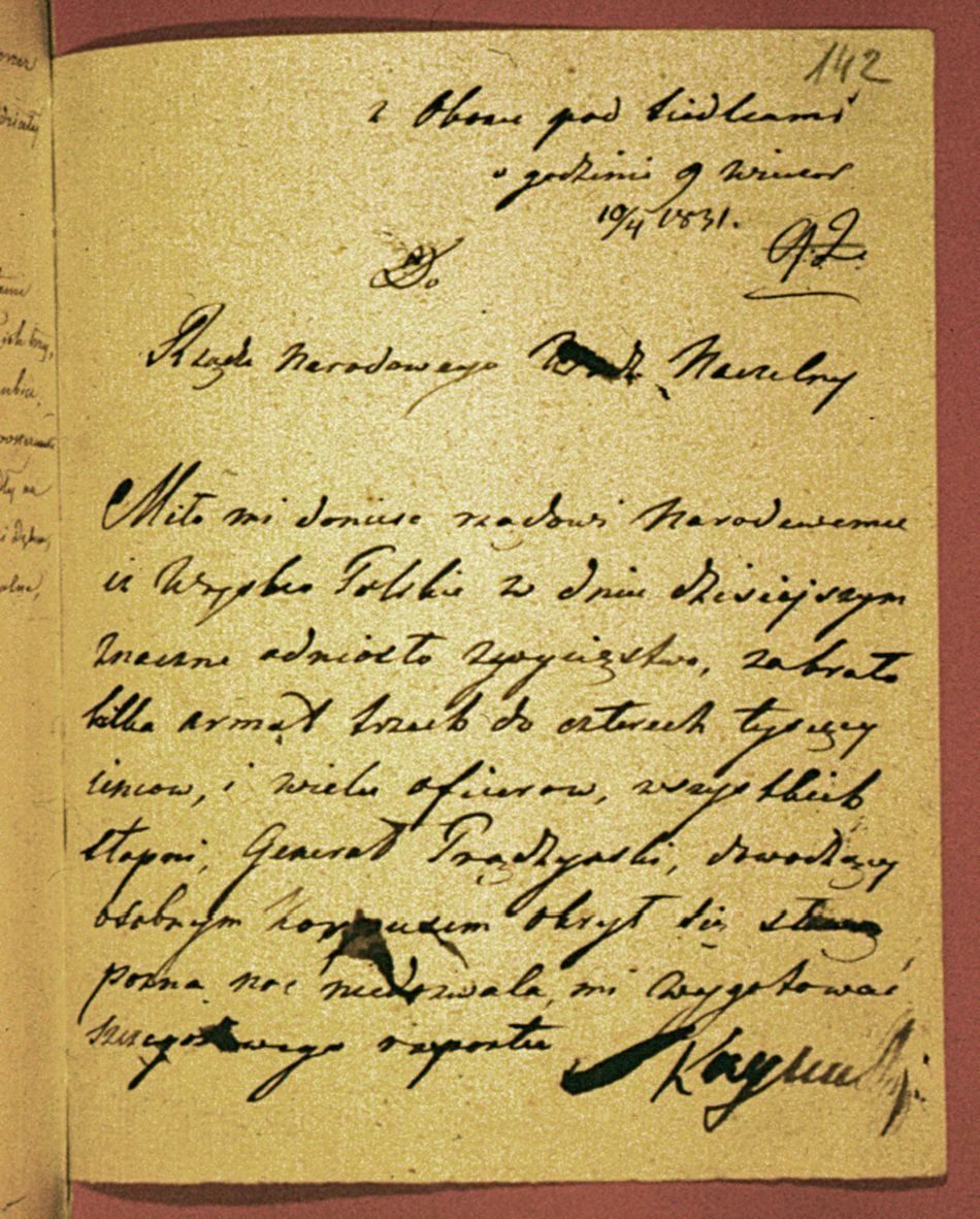 Jan Skrzynecki pisze notatkę dla Rządu Narodowego o zwycięstwie wojsk polskich pod Iganiami 10 kwietnia 1831 roku i bohaterstwie Ignacego Prądzyńskiego